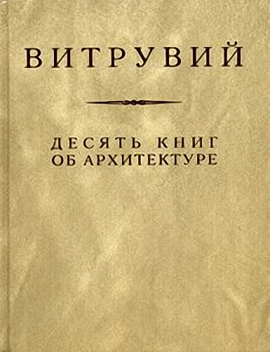 Витрувий. 10 книг об Архитектуре